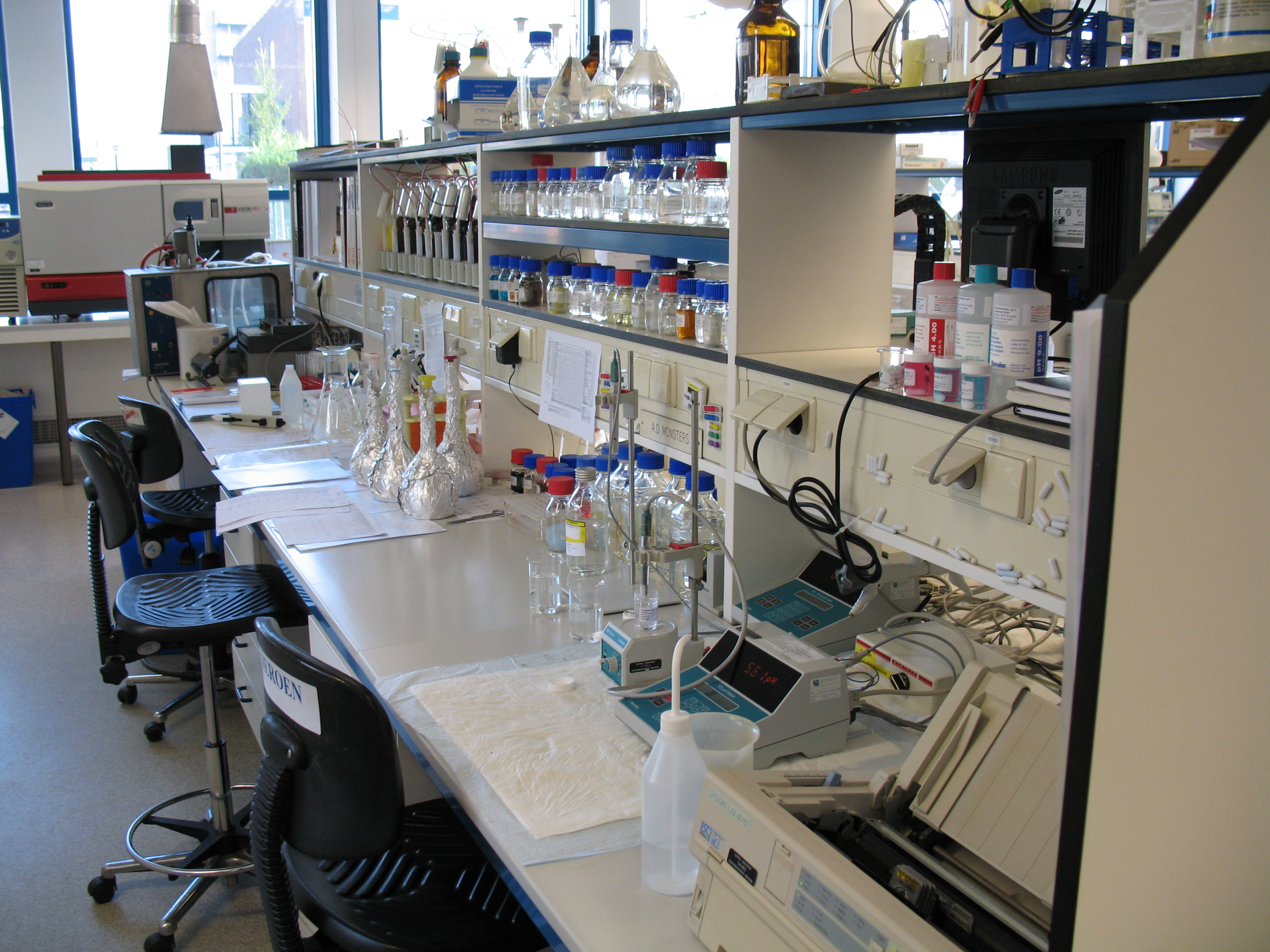 laboratorium